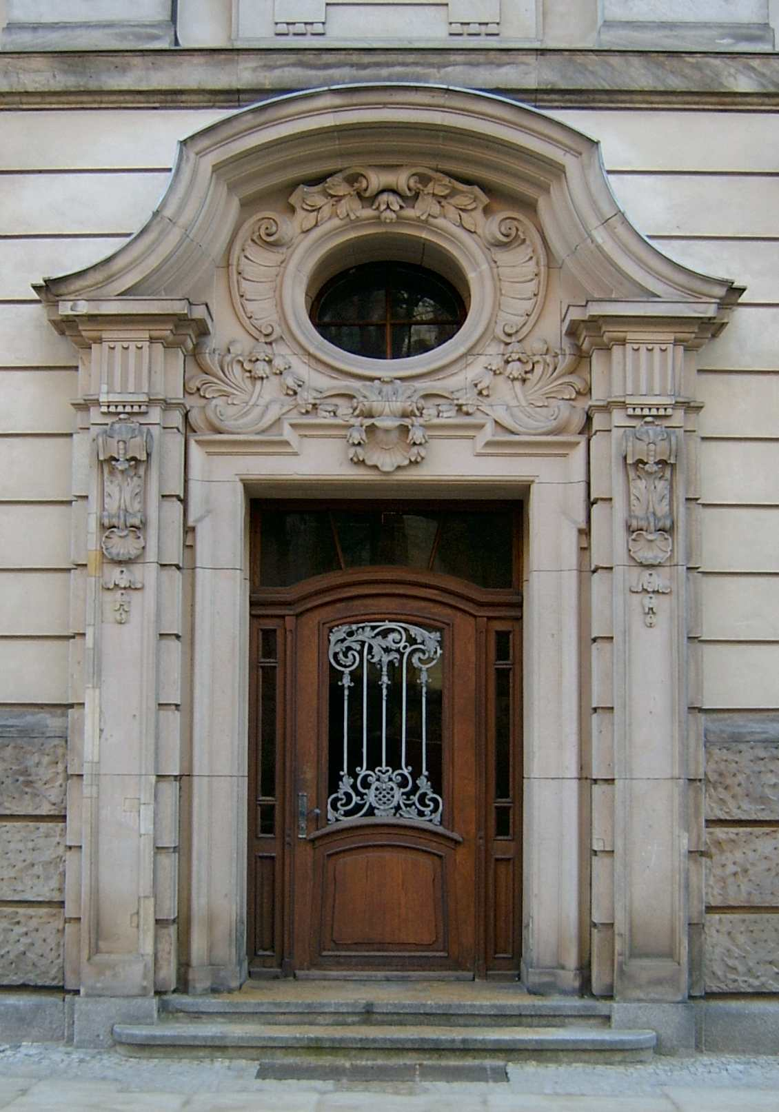 Eingang zum Hauptgebäude der Europauniversität Viadrina in Frankfurt (Oder) von der Nordseite (Regierungsstraße) date: january 2006